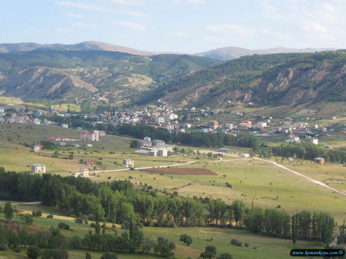 Bu resim sahip olduğum sitesi için bizzat çektiğim resimlerdir...orijinal boyutlar bendedir.benden başka hak iddia edicek kimse yoktur..